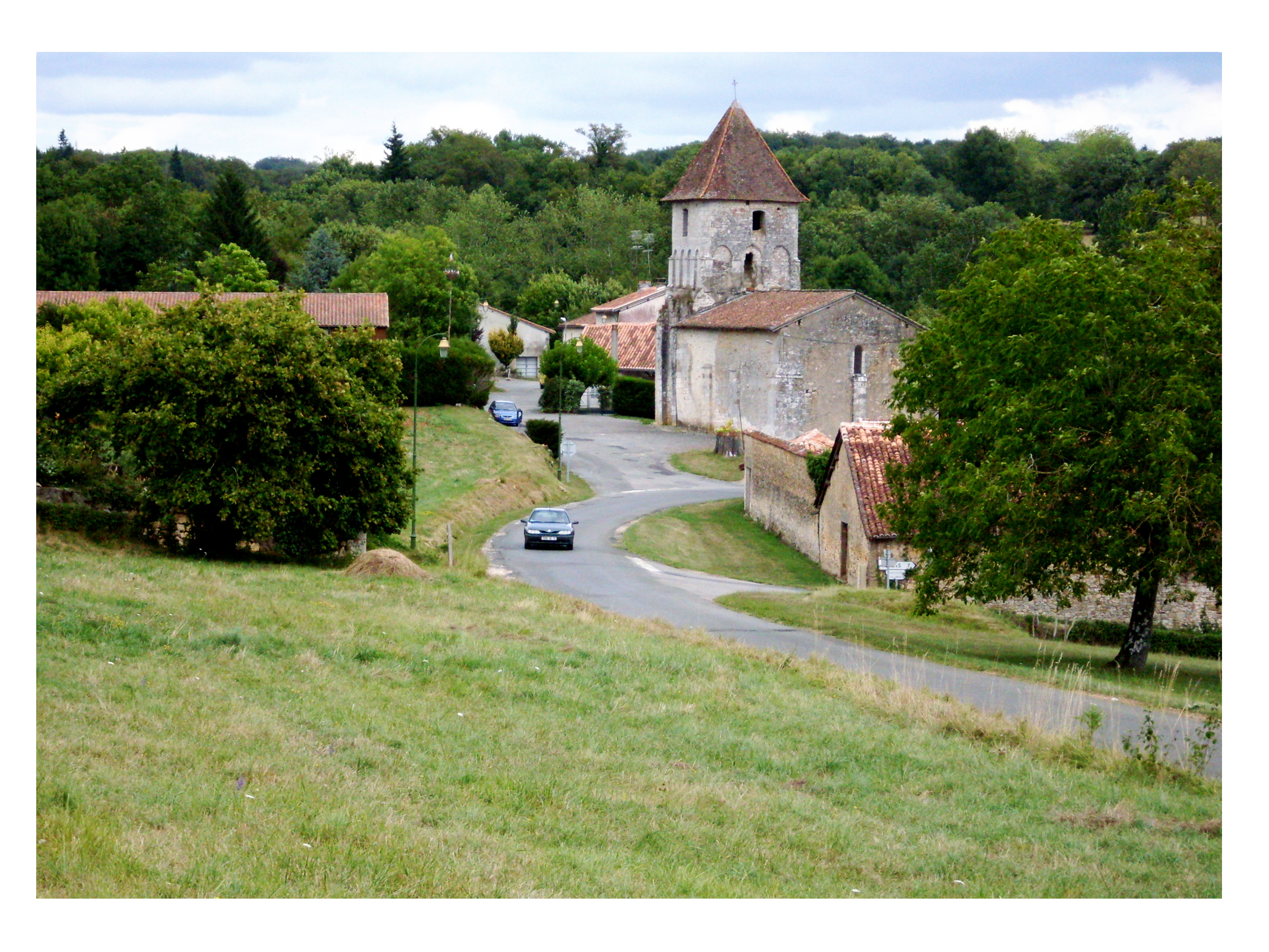 Saint-Martin-le-Pin, Dordogne, France